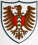 Armoiries de la commune de Cernier, Val-de-Ruz Auteur : Gérard Crameri